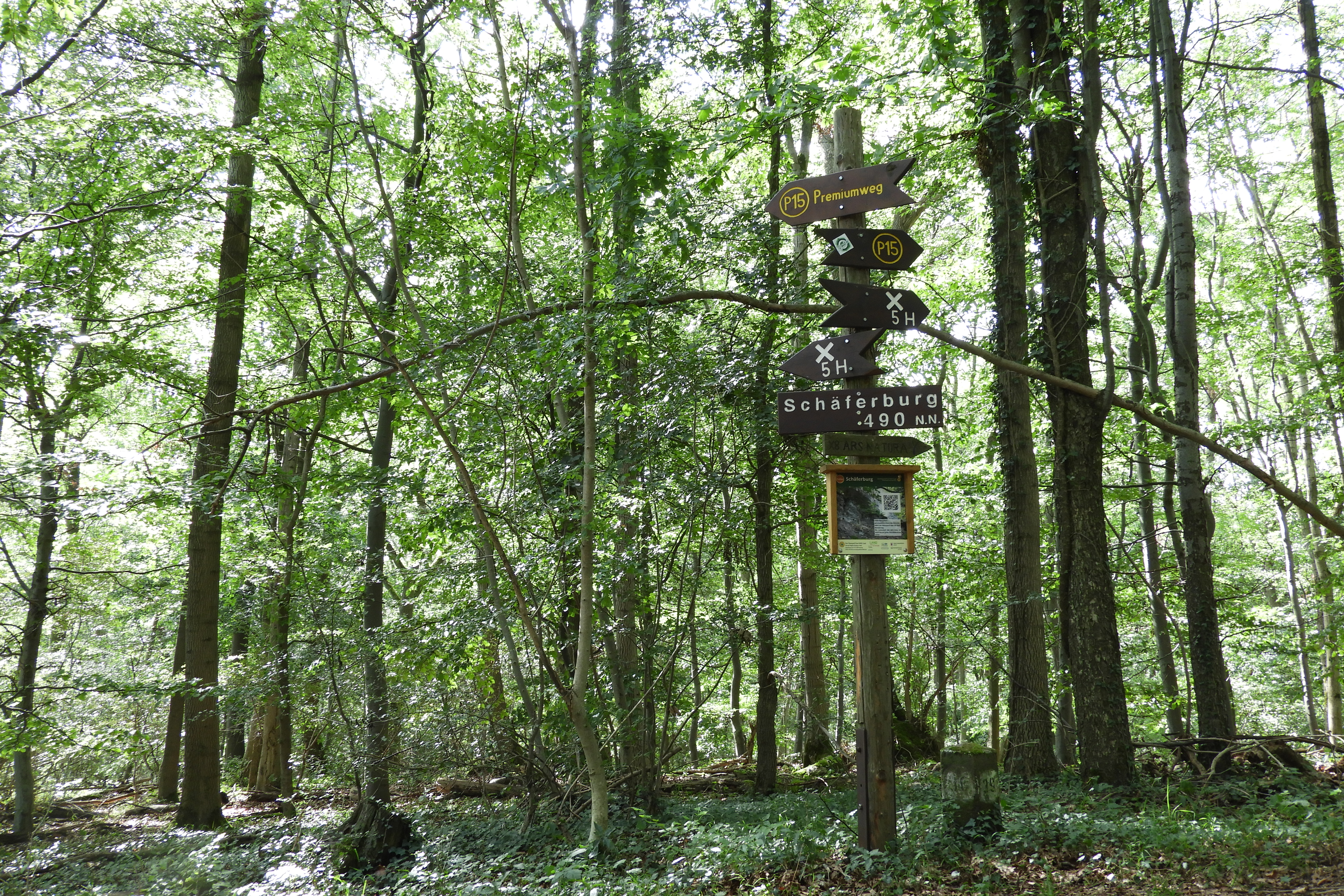 Die Graburg im nordhessischen Ringgau ist ein Bergstock aus Muschelkalk, der über einem Sockel aus Oberem Buntsandstein, der Röt genannt wird, liegt. Naturnahe Kalkbuchenwälder, Felsen und Bergstürze prägen das Gebiet in besonderer Weise. Wegen ihrer landschaftlichen Schönheit und Eigenart sowie ihrer Bedeutung als Lebensraum für seltene und bestandsgefährdete Tier- und Pflanzenarten wurde die Graburg in dem Jahr 1915 als Naturdenkmal und ab Mai 1965 als Naturschutzgebiet unter besonderen Schutz gestellt. Als Wuchsort seltener Pflanzengesellschaften und aufgrund ihres außergewöhnlichen floristischen Reichtums wird die Graburg zu den bedeutendsten Naturschutzgebieten in Hessen gezählt. Die hier vorhandenen zahlreichen Vegetationseinheiten, die in großer Vielfalt und einer charakteristischen Abfolge vorkommen, gelten als wertvoll für Forschung und Lehre. Als besonders schutzwürdig werden auch die orchideenreichen Kalkmagerrasen, der hessenweit größte Eibenbestand, die großen Bergstürze mit ihren Blaugrashalden sowie die zahlreichen Höhlen in den Felsbereichen als Winterquartiere für gefährdete Fledermausarten angesehen.